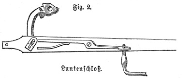 Luntenschloss